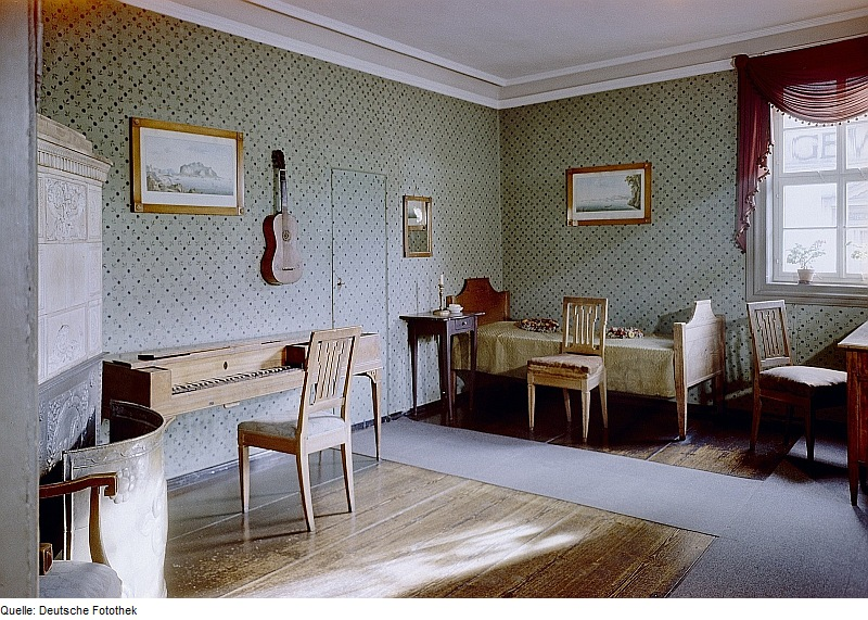 Original image description from the Deutsche Fotothek Weimar. Schillerhaus, Arbeits- und Sterbezimmer